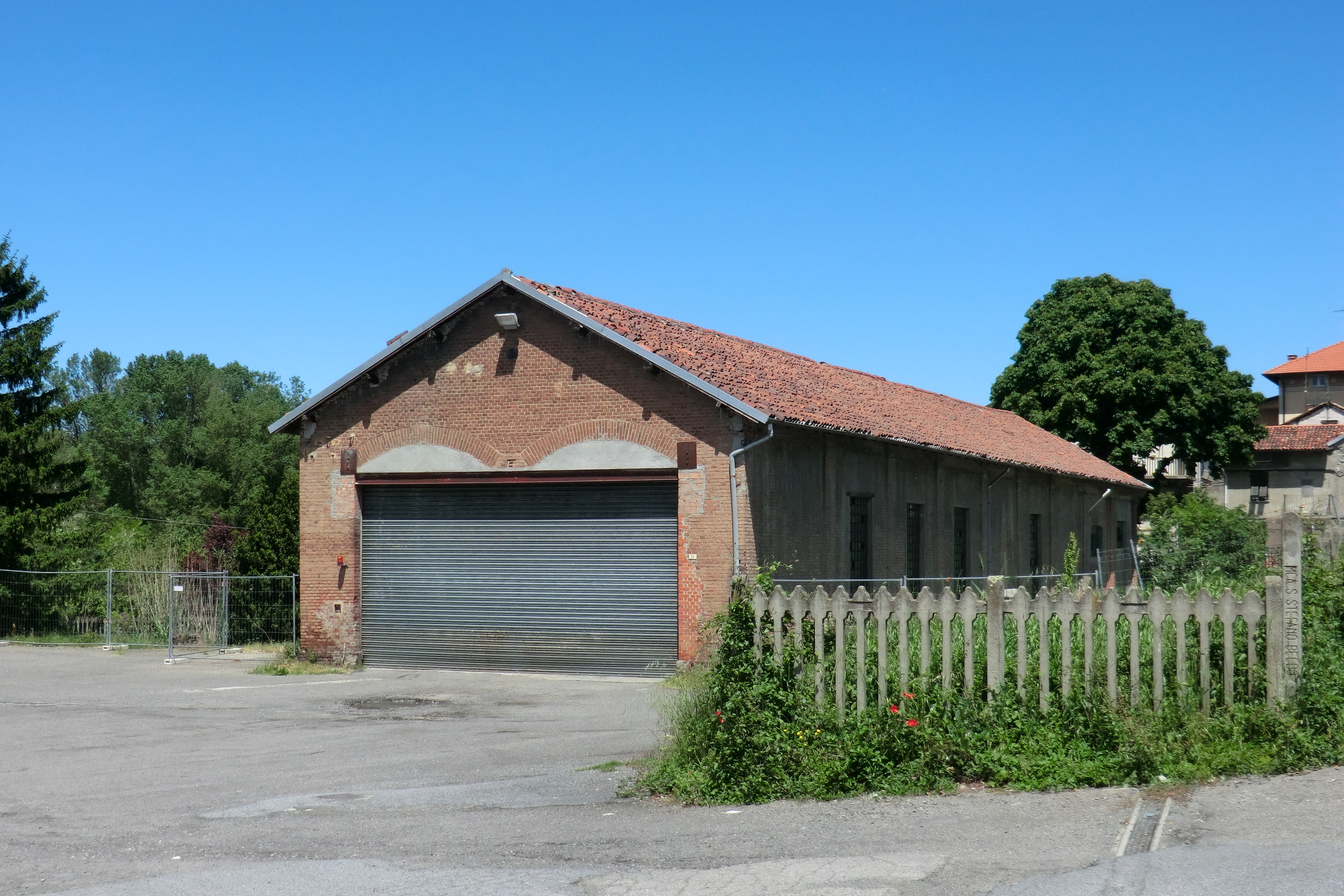 Rimessa FVO di Ovada